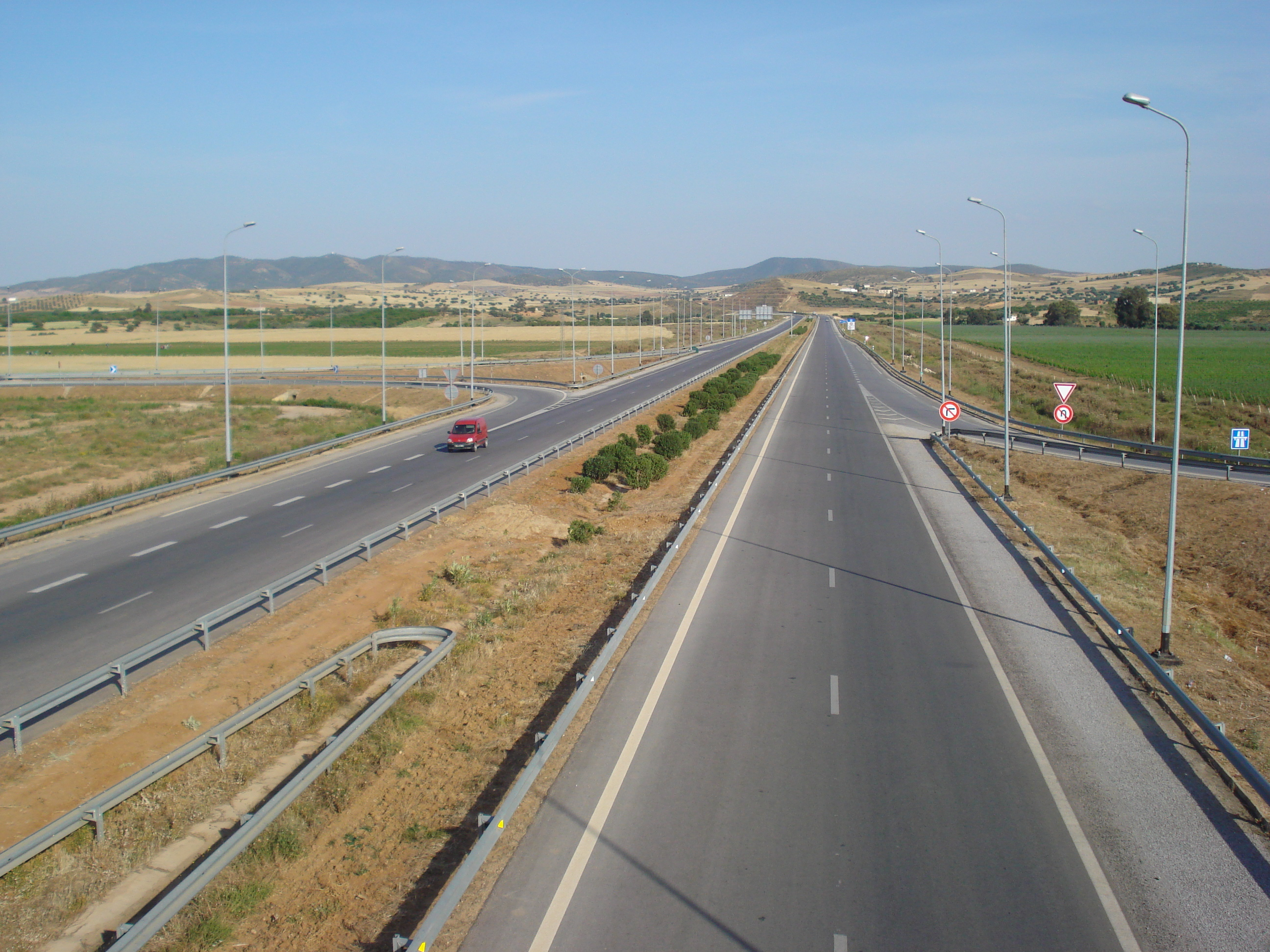 Autouroute Tunis-Béja (Tunisie)